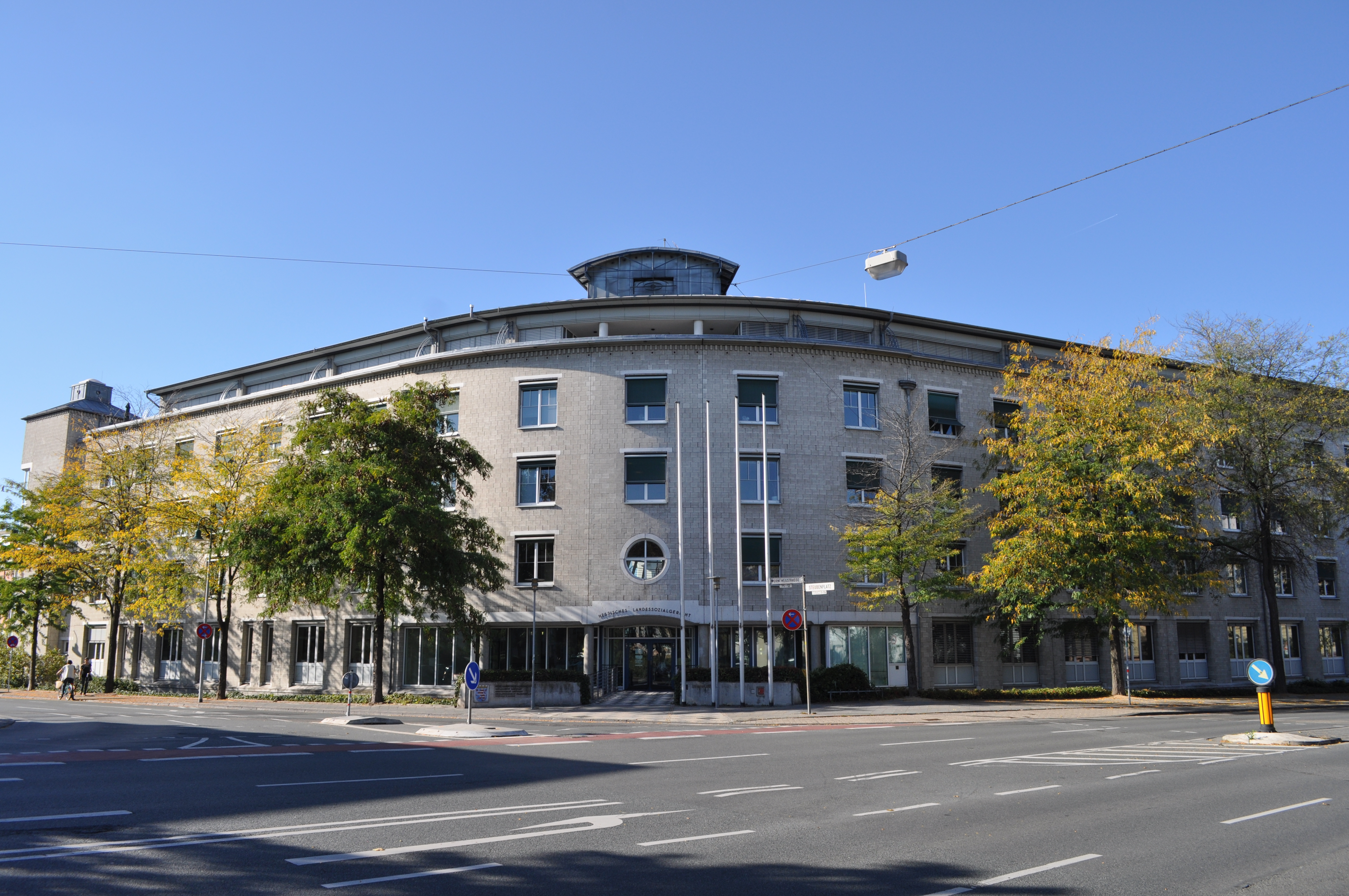 Gebäude des Landessozialgerichtes in Darmstadt, Steubenplatz 14. Im Haus ist auch das Sozialgericht Darmstadt und das Arbeitsgericht Darmstadt untergebracht.